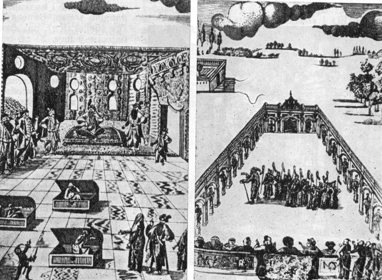 Гравюра, изображающая театр Радзивиллов в Несвиже